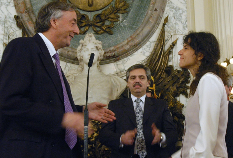 Jura Secretaria de Medio Ambiente - Salon Blanco Casa de Gobierno. Dra. Romina PICOLOTTI jura como Secretaria de Medio Ambiente.